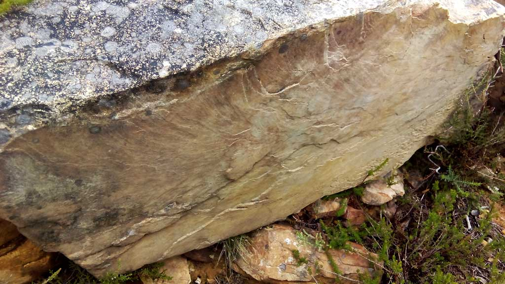 Imaxe dunha das pedras do muro exterior.